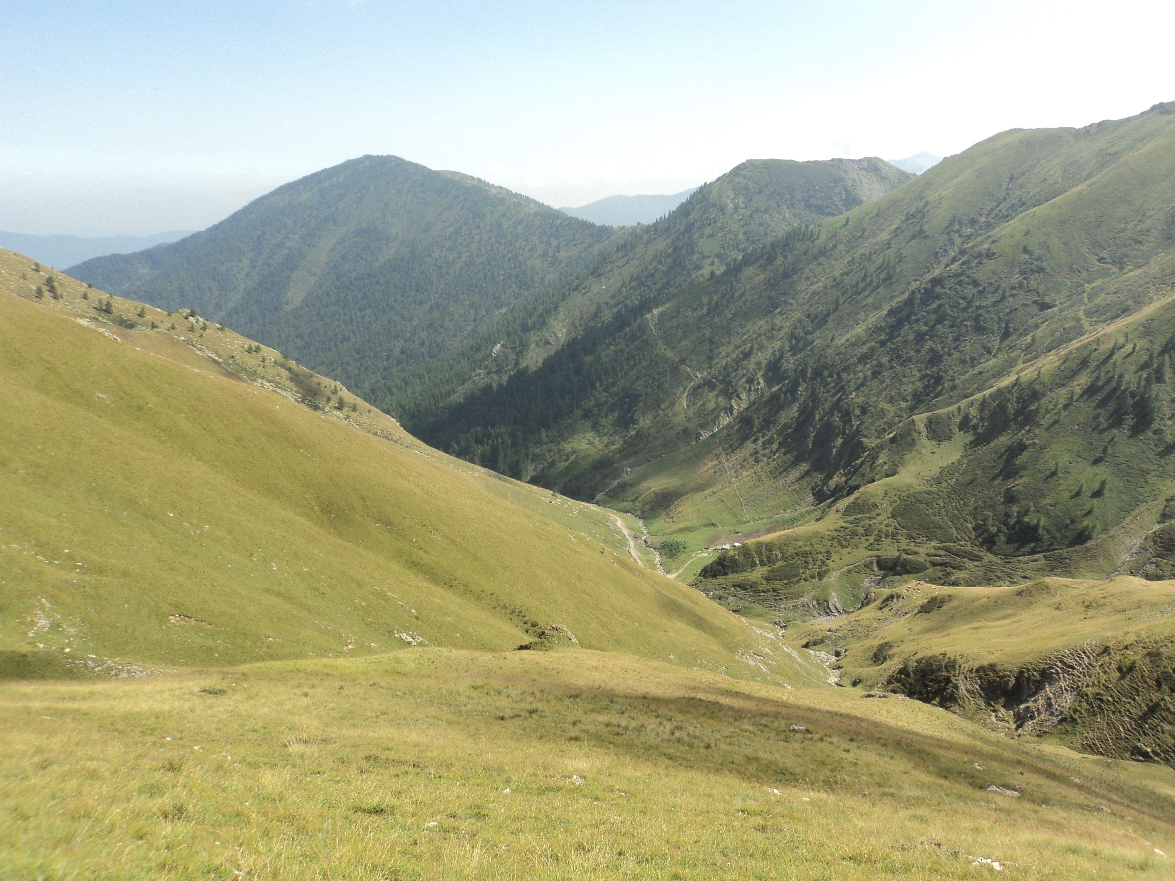 Vallone del Bourcet - laterale della Val Chisone - Provincia di Torino